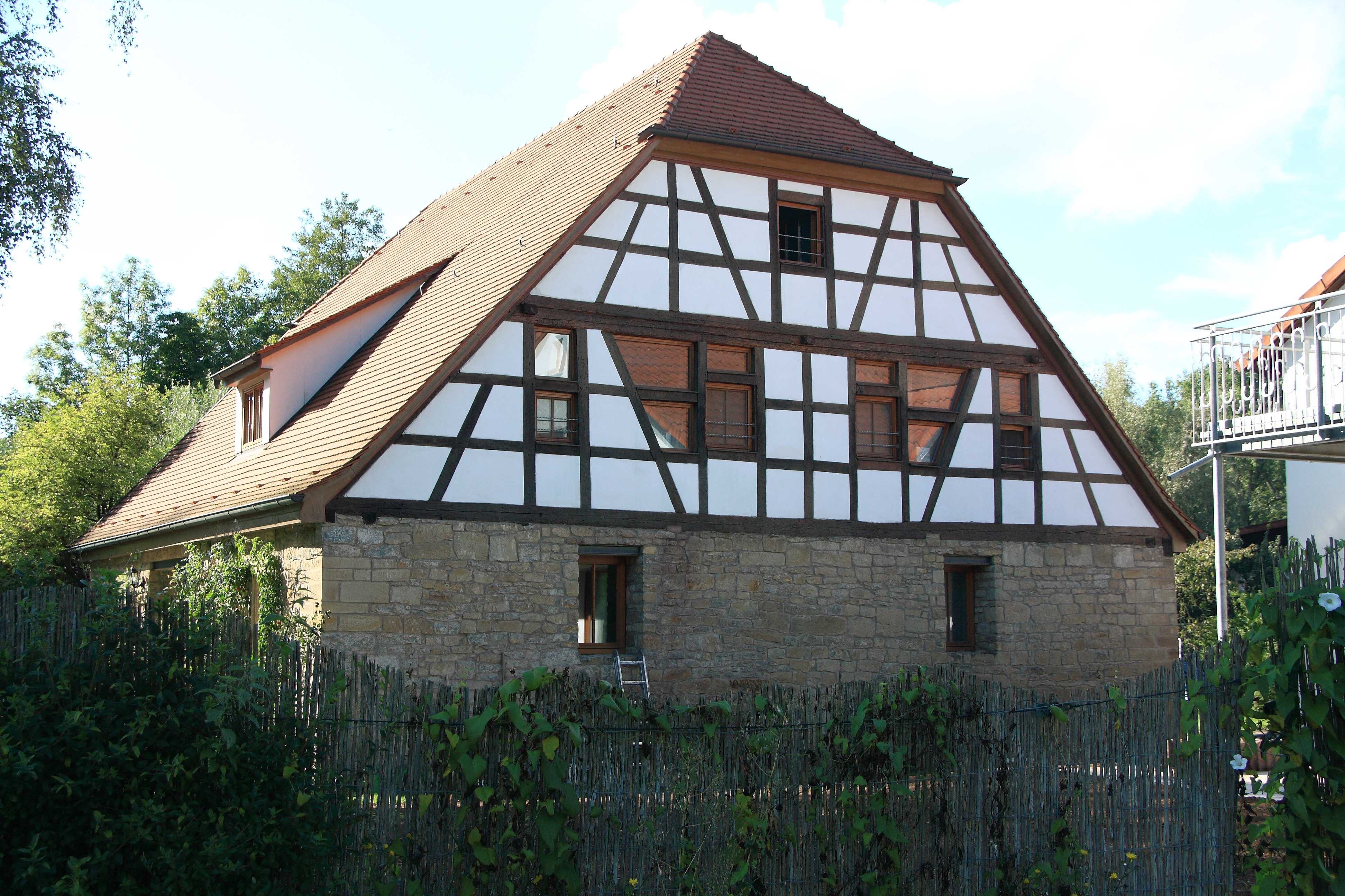 Ehemalige Fachwerkscheuer der Taubermühle. Heute ein Wohnhaus.